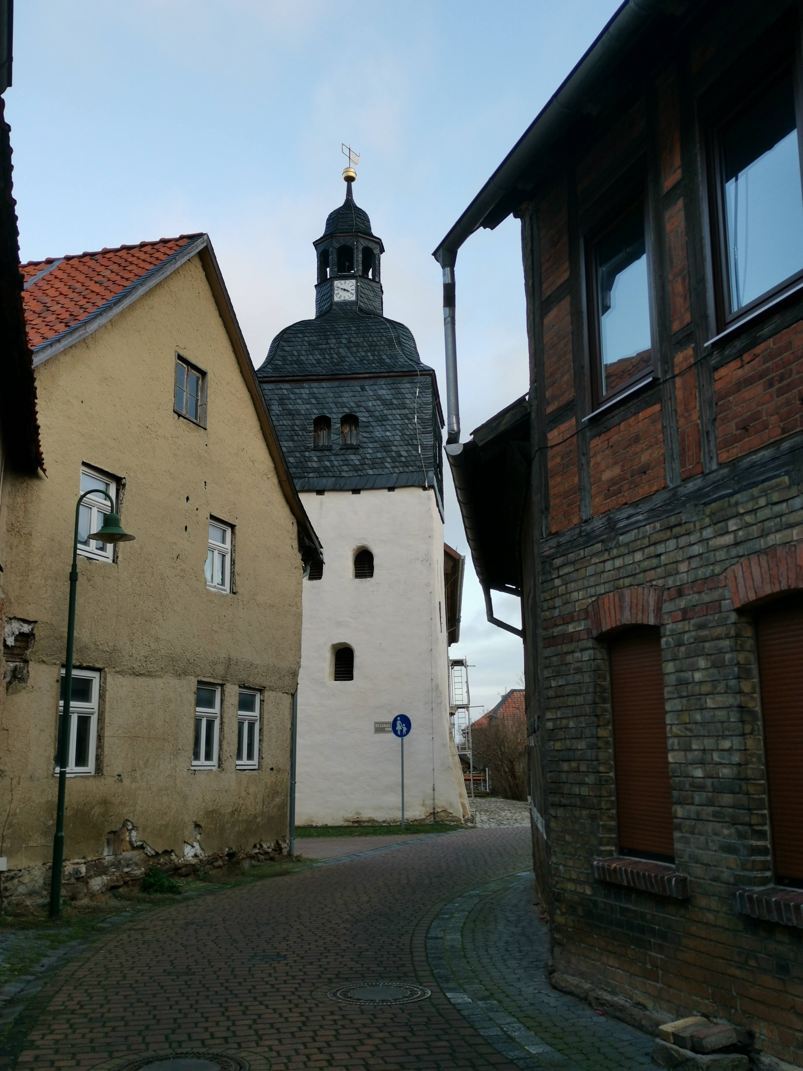 St. Lukas Kirche in Timmenrode